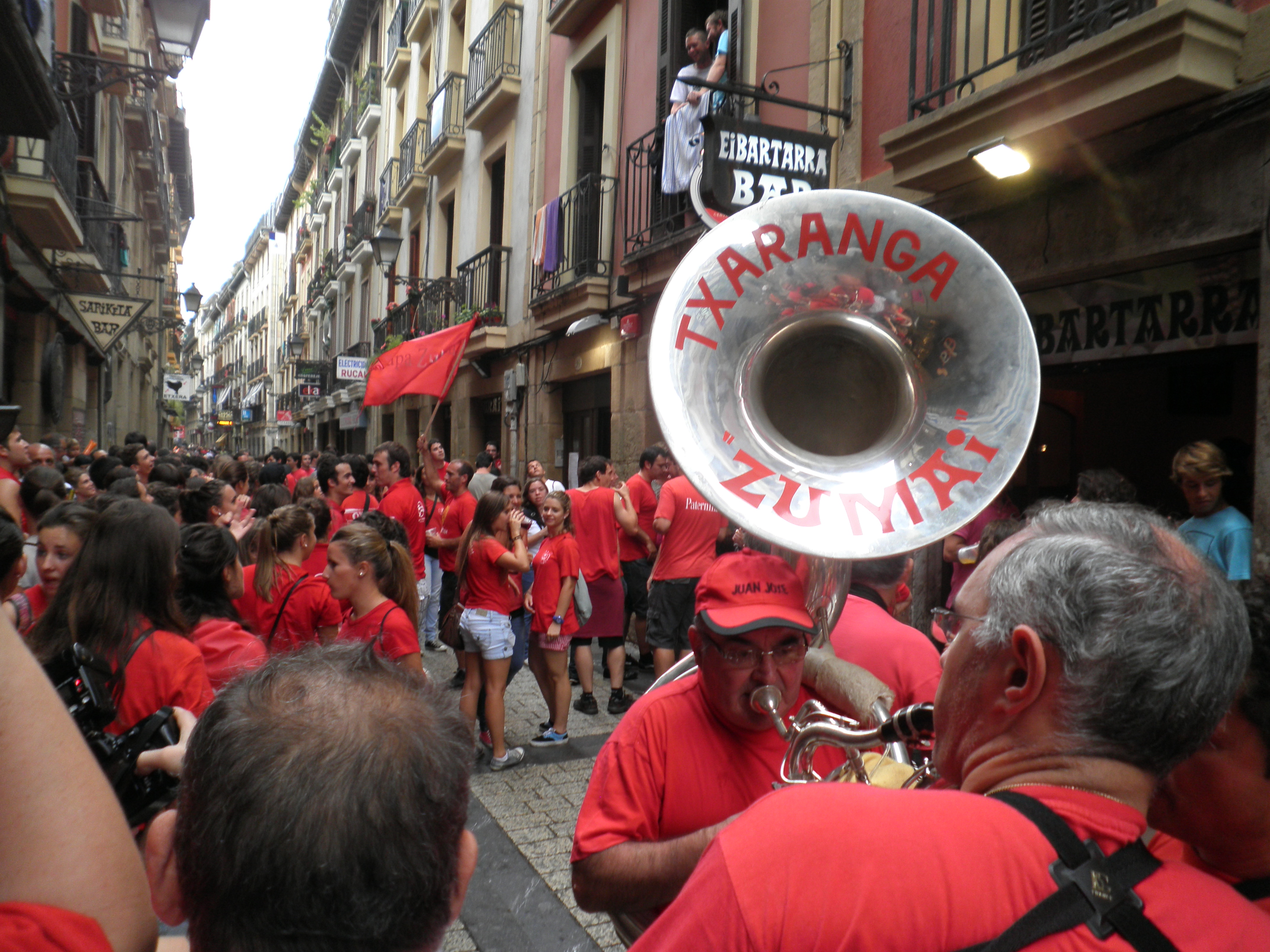 Zumaiako traineruaren jarraitzaileak Donostiako parte zaharrean, bertako txarangarekin batera.